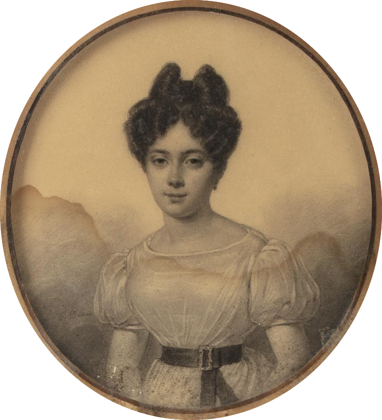 Madame Amédée Marc-Homberg (morte en 1875)